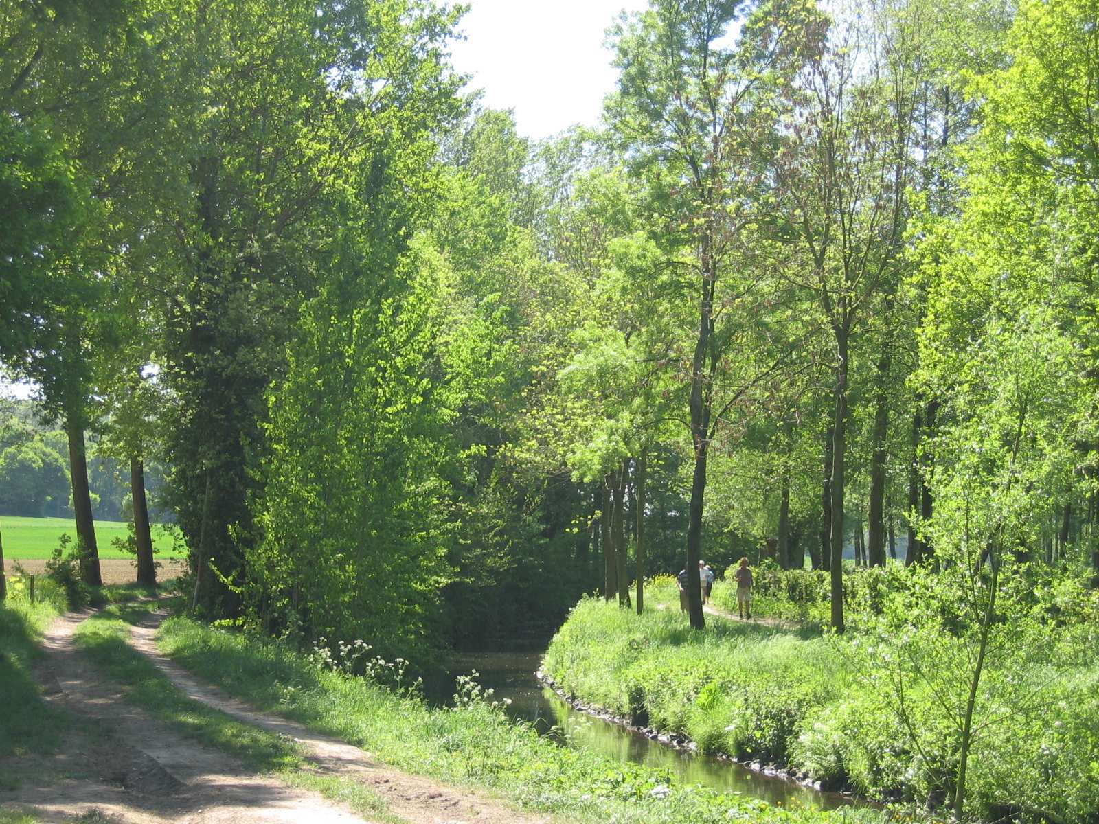 Wurmtal_bei_Rimburg, die Wurm als Grenzfluss; links Deutschland-rechts Niederland